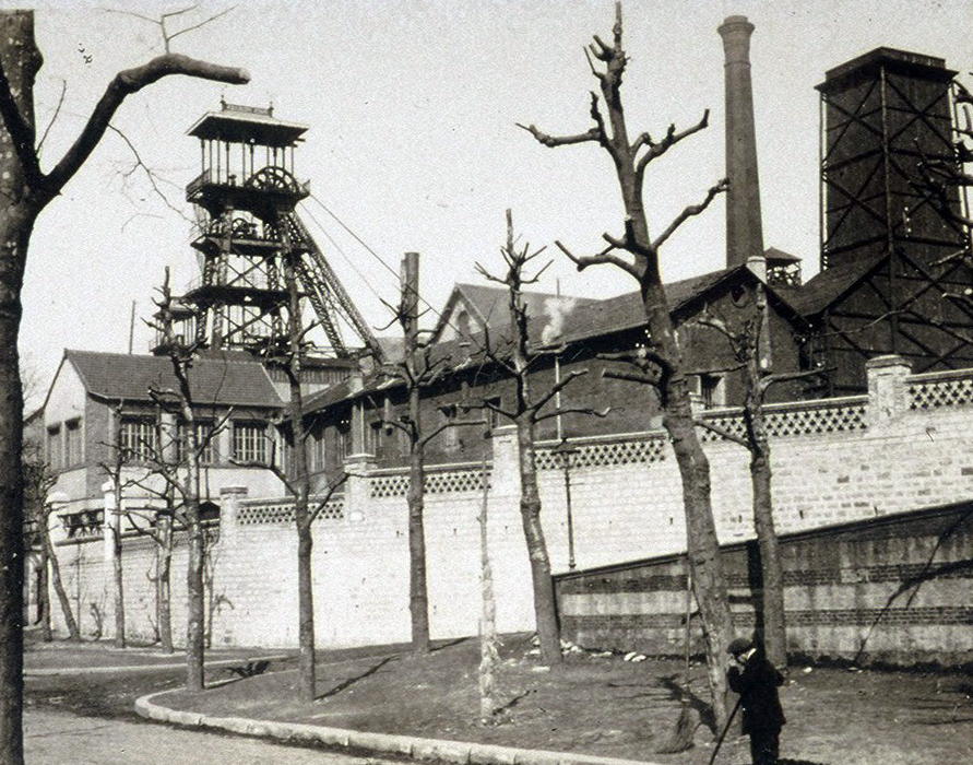 Puits Pelissier à St.-Etienne